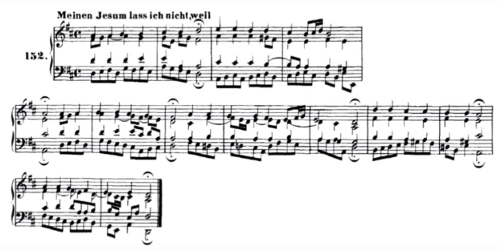 Meinen Jesum lass ich nicht, Satz von Johann Sebastian Bach (Schlusschoral der Kantate 154) mit der Melodie von Andreas Hammerschmidt